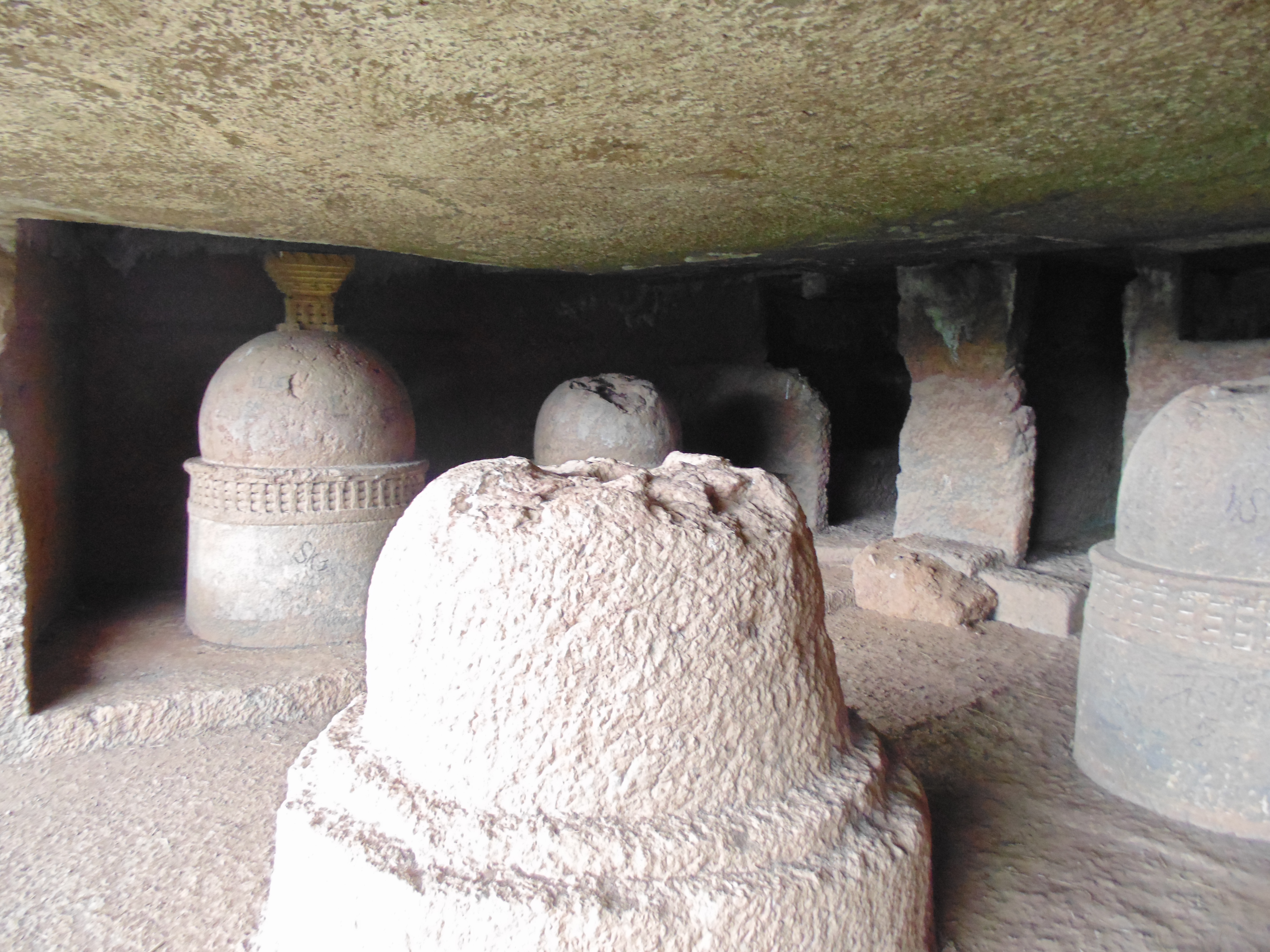 ठाणाळे येथील स्तूप